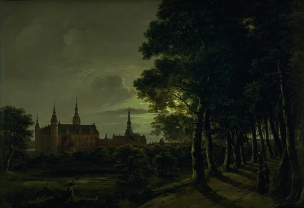 Moonlit Frederiksborg Castlelabel QS:Len,"Moonlit Frederiksborg Castle"